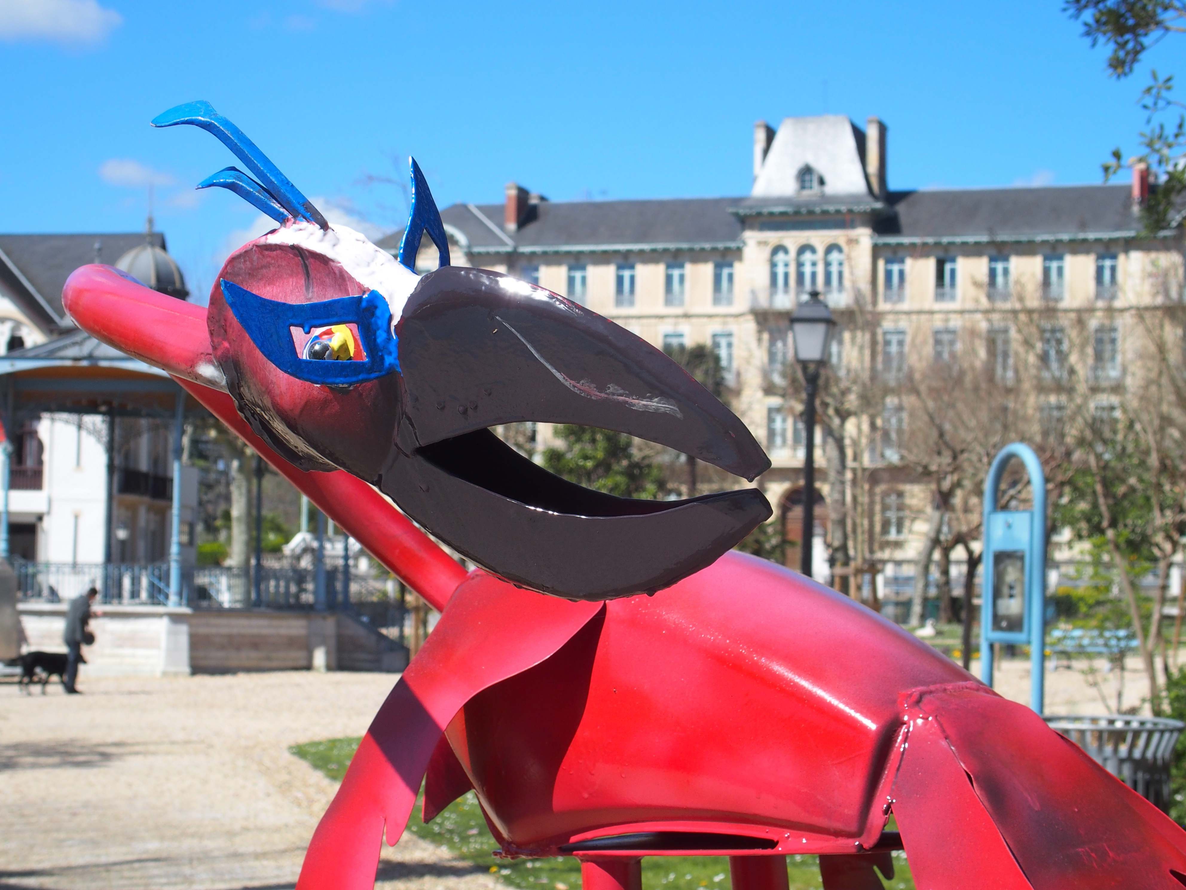 Arc en Vrac